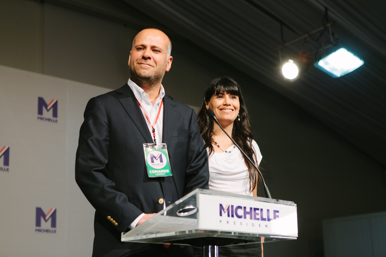 Elecciones 2013 desde el hotel Plaza San Francisco 15/12/2013